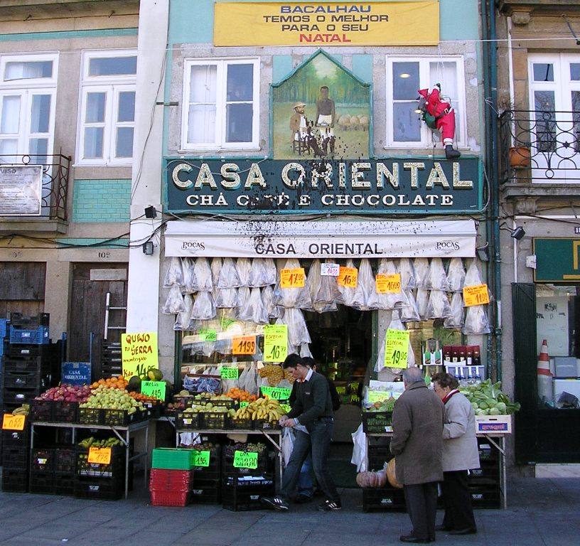 "Casa Oriental", traditional shop in Porto, Portugal.